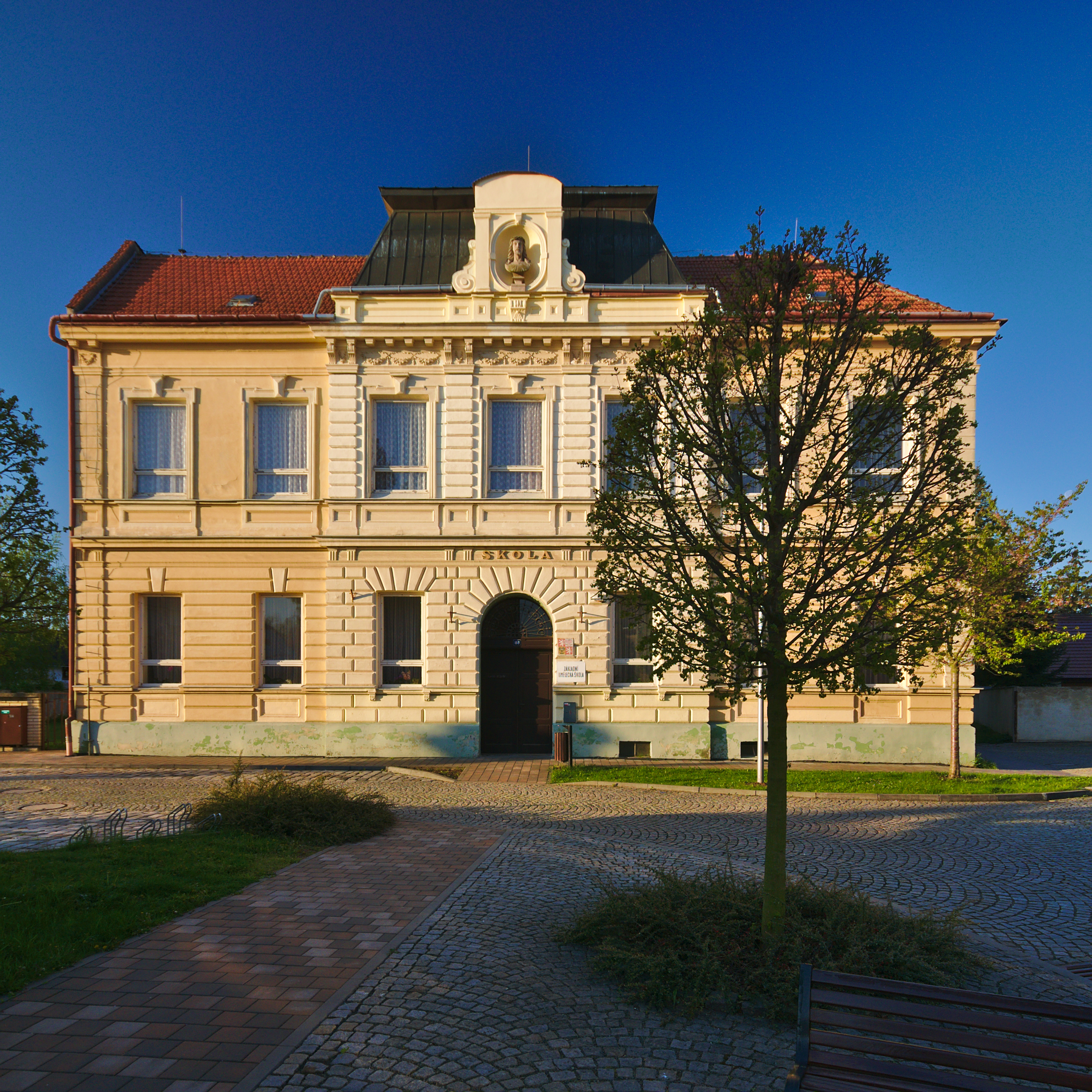 Základní umělecká škola, Němčice nad Hanou, okres Prostějov